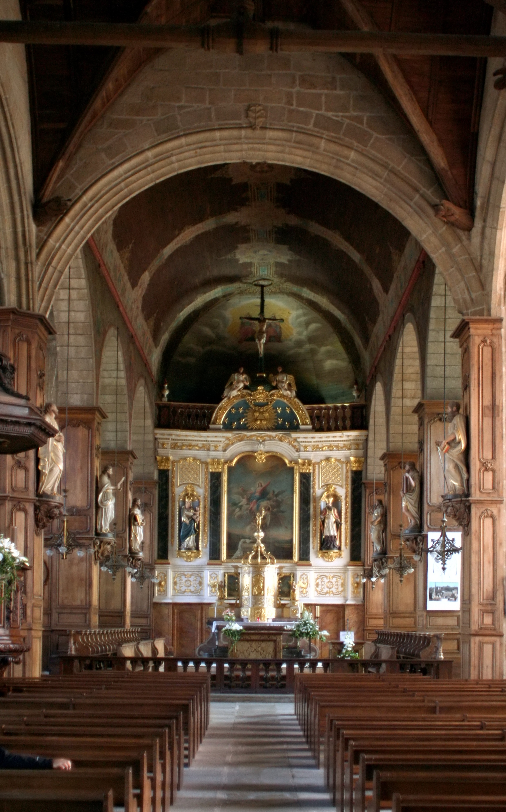 Église Saint-Sulpice de Fougères Intérieur